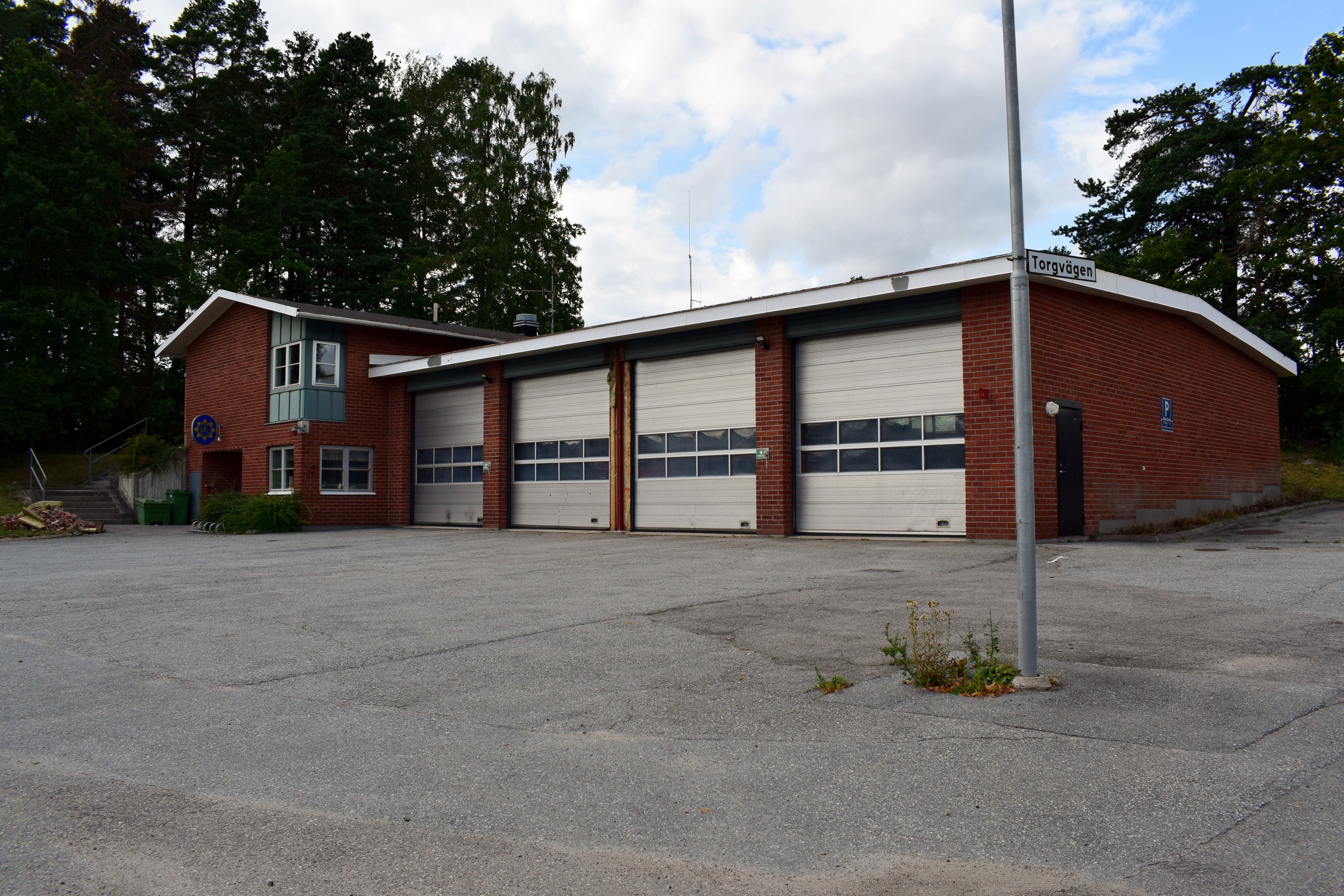 Brandstationen i Fellingsbro